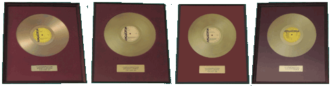 Süsü, a sárkány meselemezek (aranylemezek)